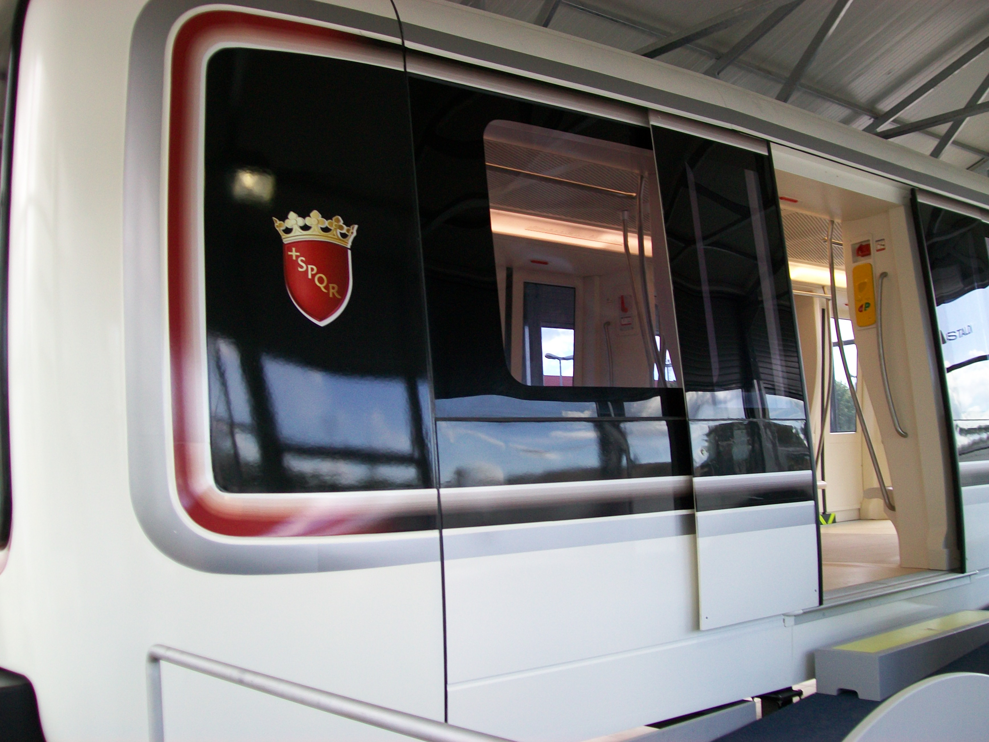 Vagone della Metro C (Roma) con lo stemma del comune di Roma. Il vagone espositivo si trova dentro una costruzione di vetro nei pressi del cantiere Teano-Quintiliani.